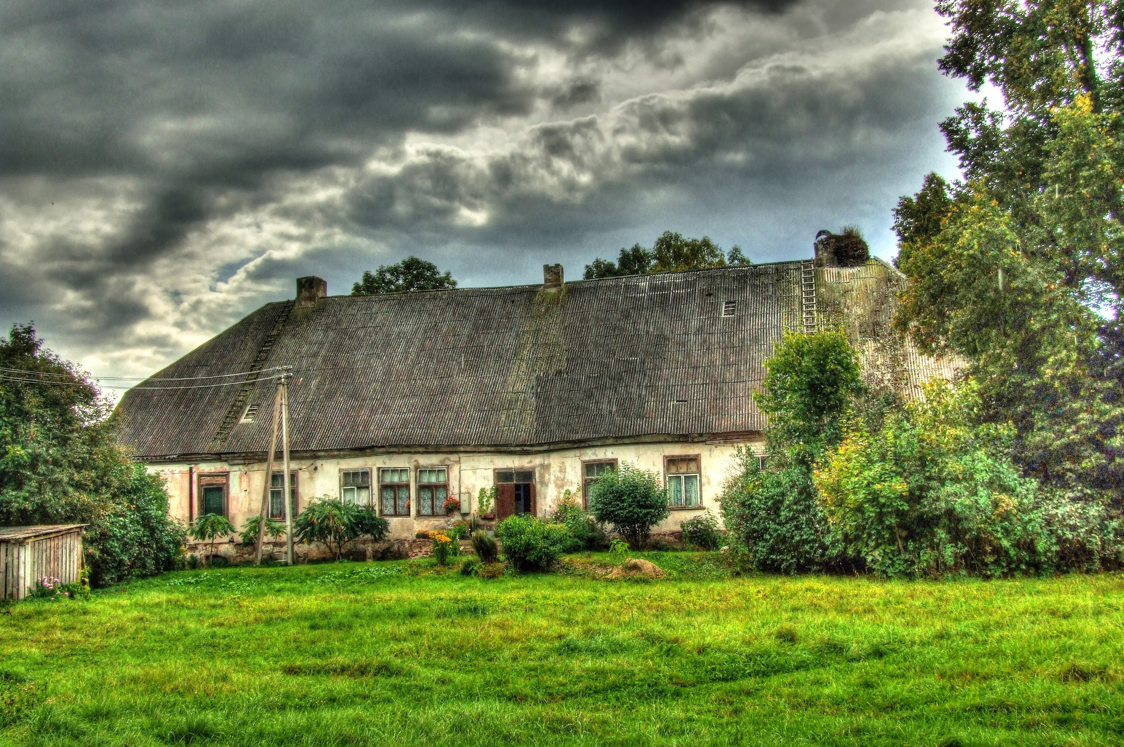 Galtene manor/ Galtenes muiža